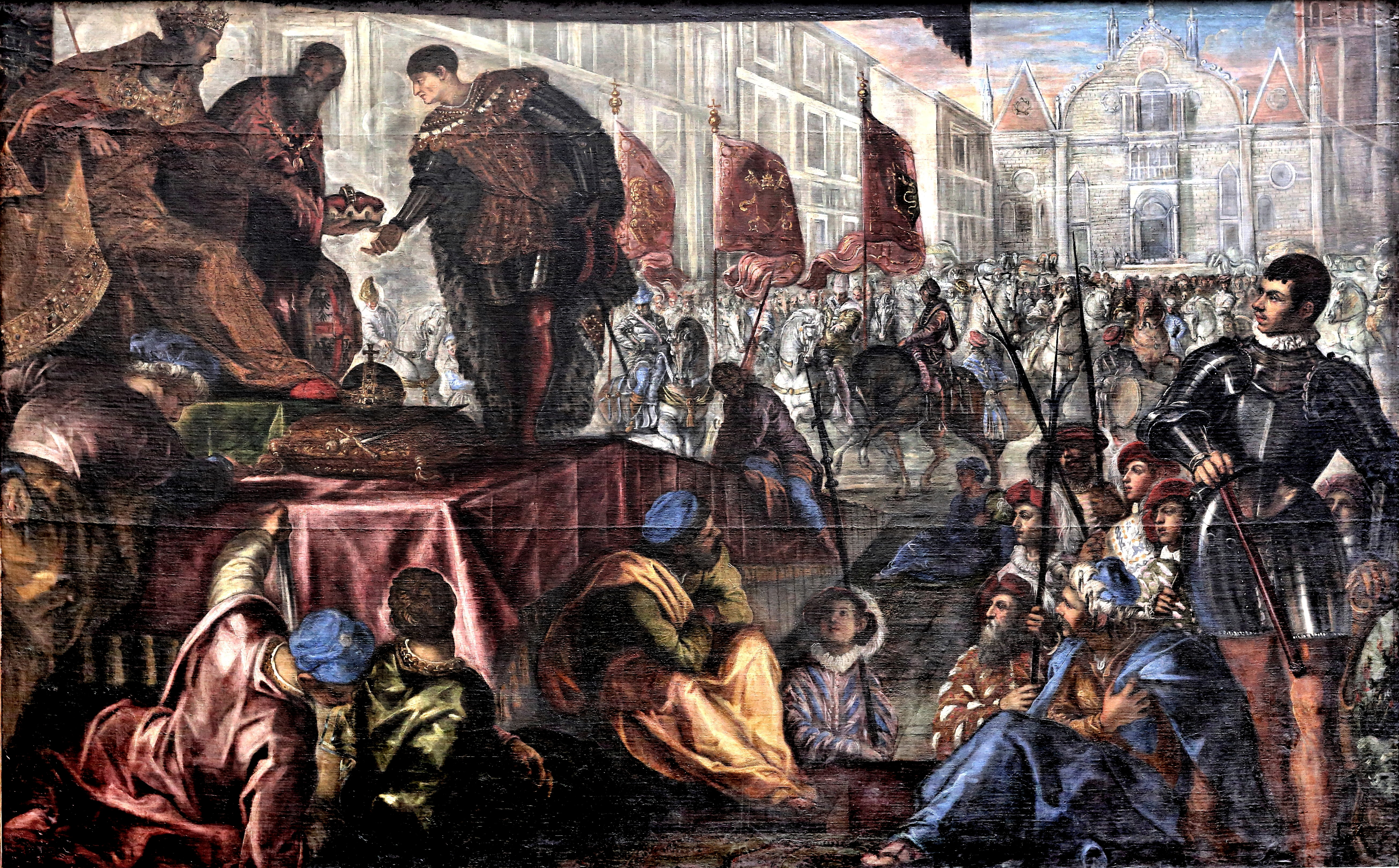 Giovanni Francesco Gonzaga nominato marchese di Mantova dall'imperatore Sigismondo - Olio su tela, cm. 272.5 × 432